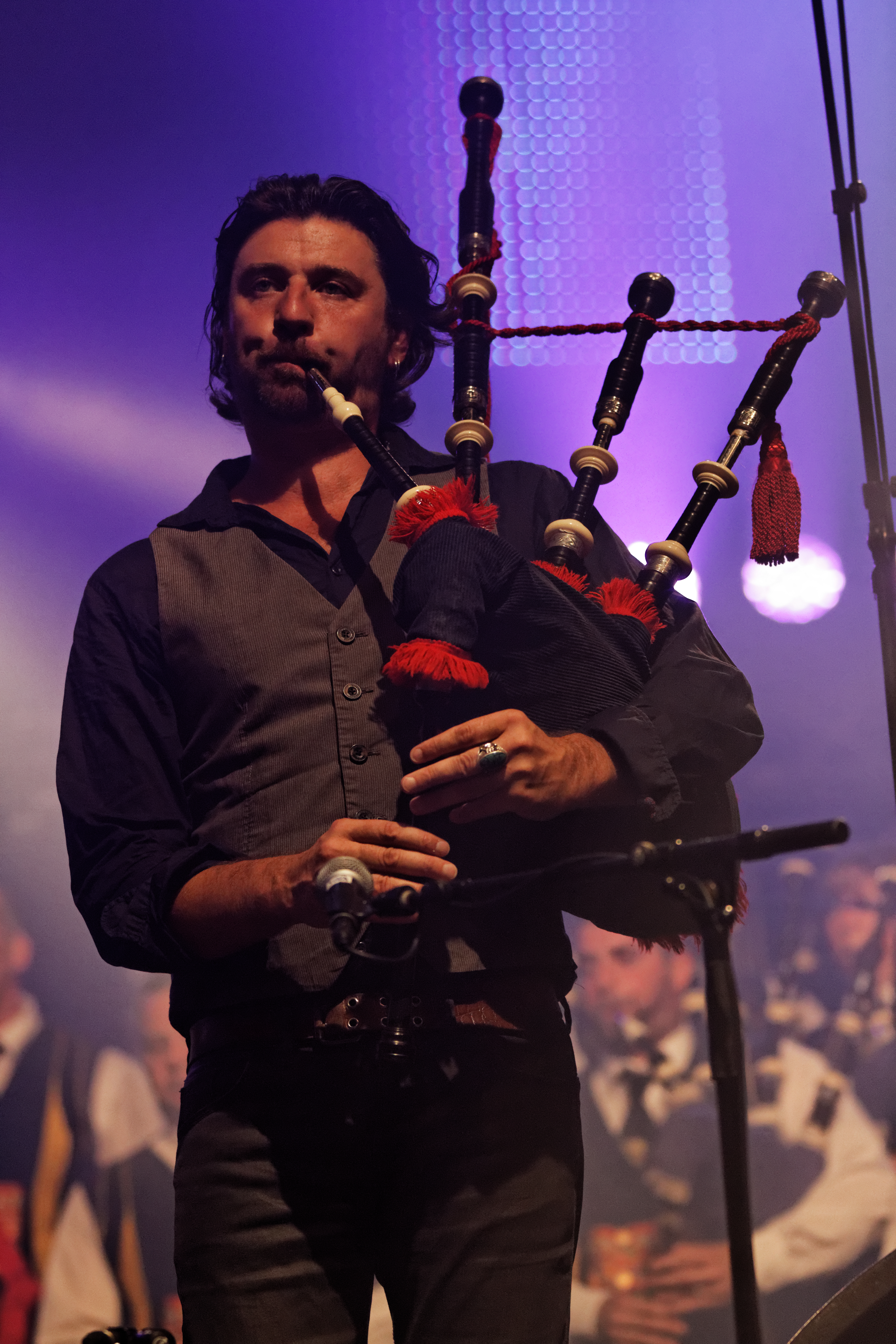 Dan ar Braz en concert sur la scène Gradlon lors du festival de Cornouaille 2013.